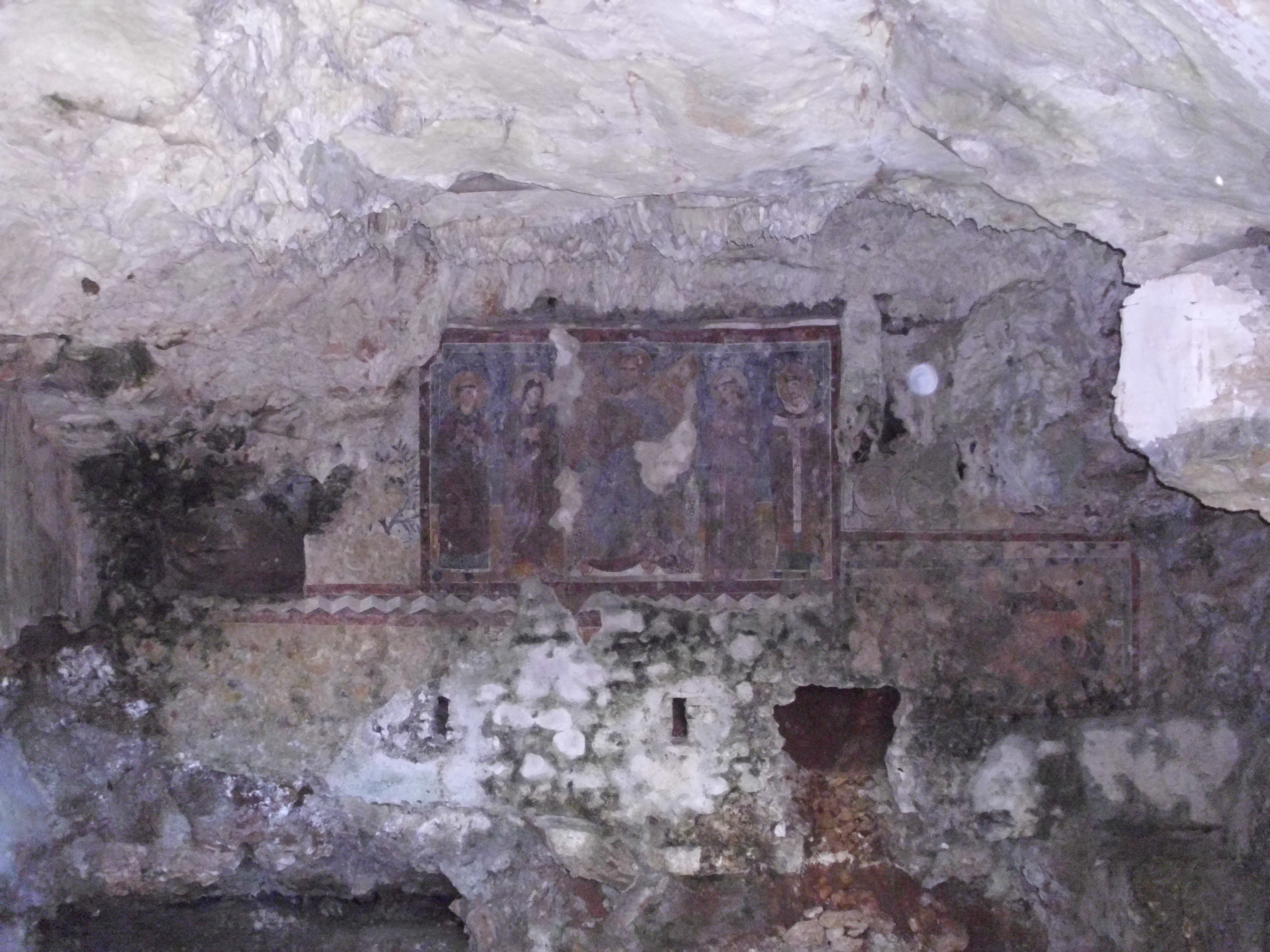 La Grotta di Selva Oscura: affresco sulla parete della grotta raffigurante Gesù attorniato da San Leonardo, San Giacomo, San Francesco e Leone IX. This is a photo of a monument which is part of cultural heritage of Italy.